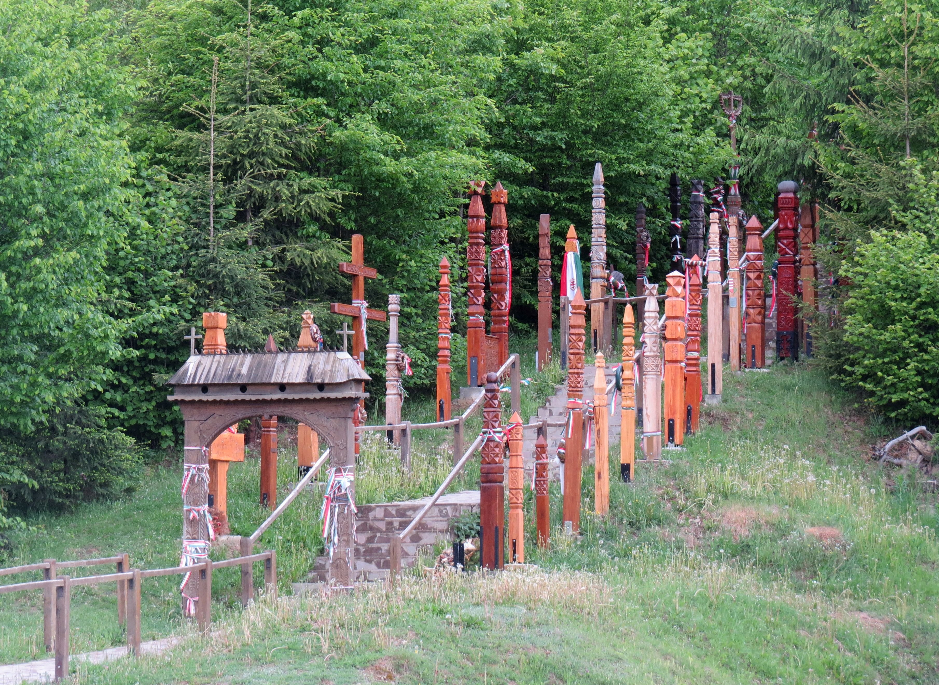 Nyerges-tető, az 1848–49-es forradalom és szabadságharc egyik utolsó székelyföldi csatájának színhelye. Az erdő szélén lévő területen, egy tömegsírba hantolták el akkor az ütközet áldozatait, akiknek emlékét többek közt számtalan kopjafa őrzi.